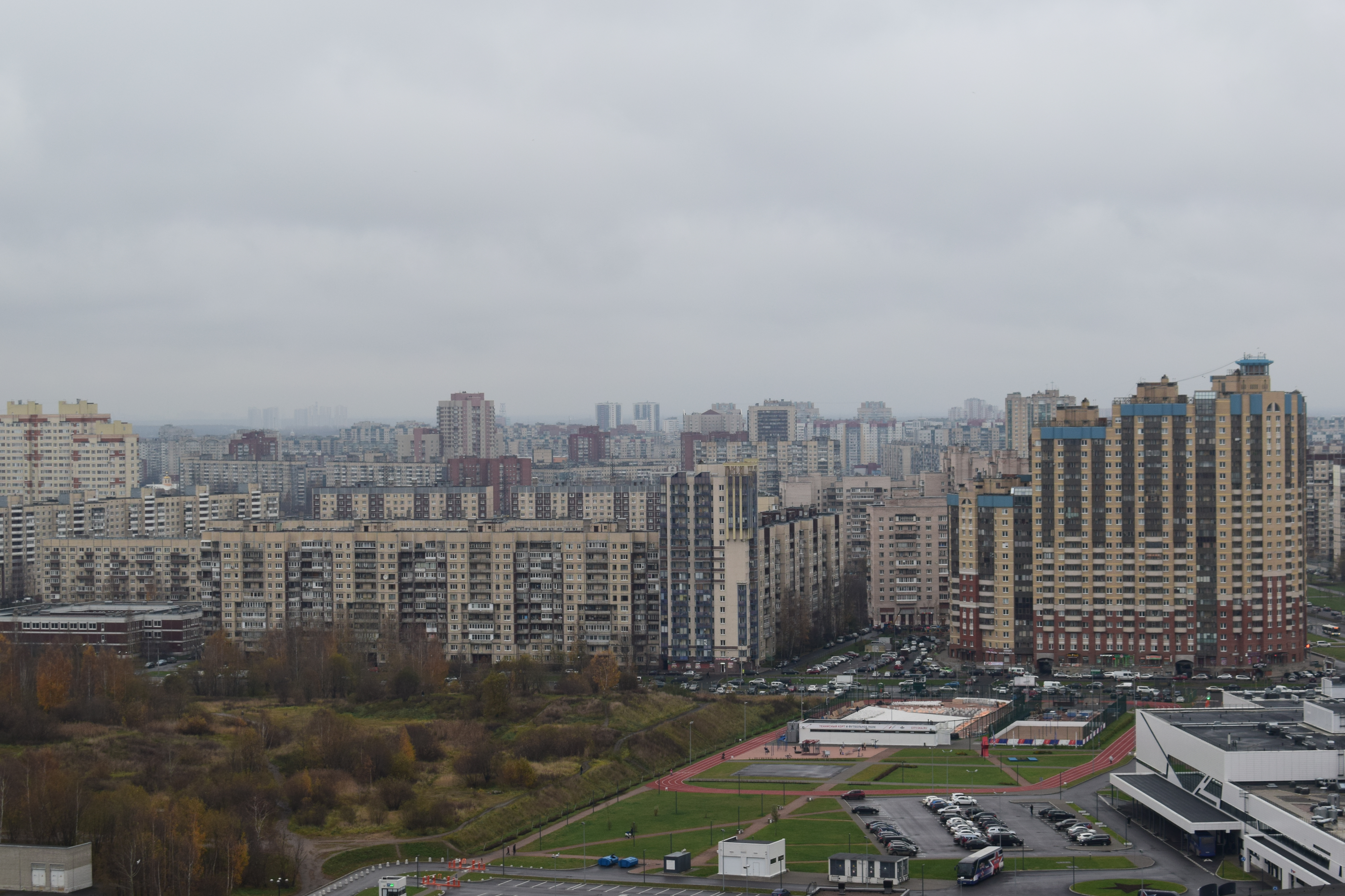 Дома по ул. Латышских стрелков в Санкт-Петербурге (на переднем плане)